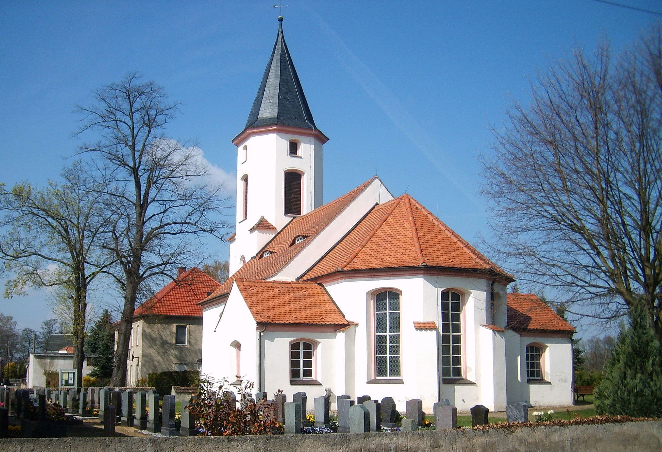 Koselitz.